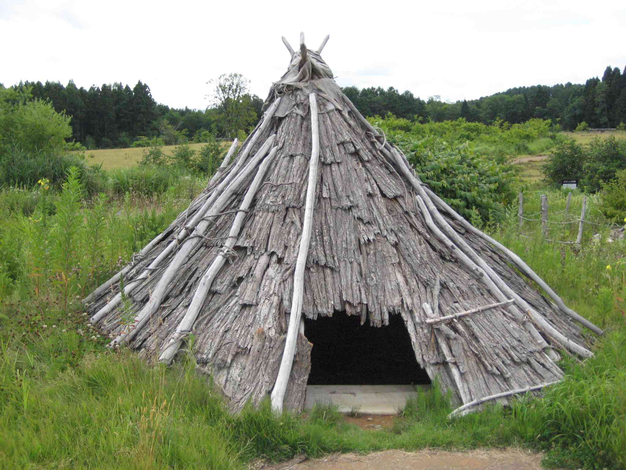 Reconstruction d'une habitation en tipi au Site de Sannai Maruyama